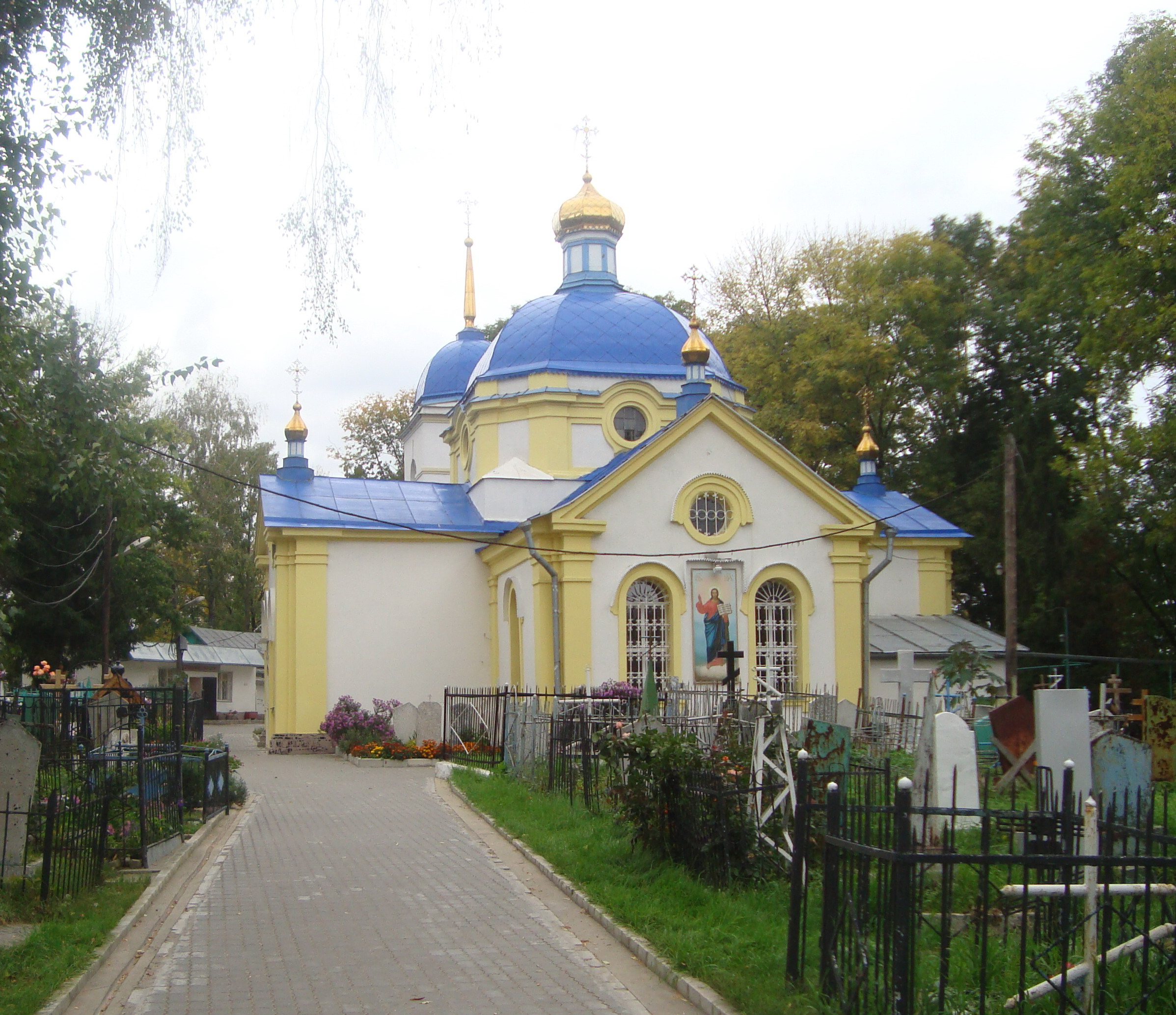 Спасо-Преображенская церковь в Липецке